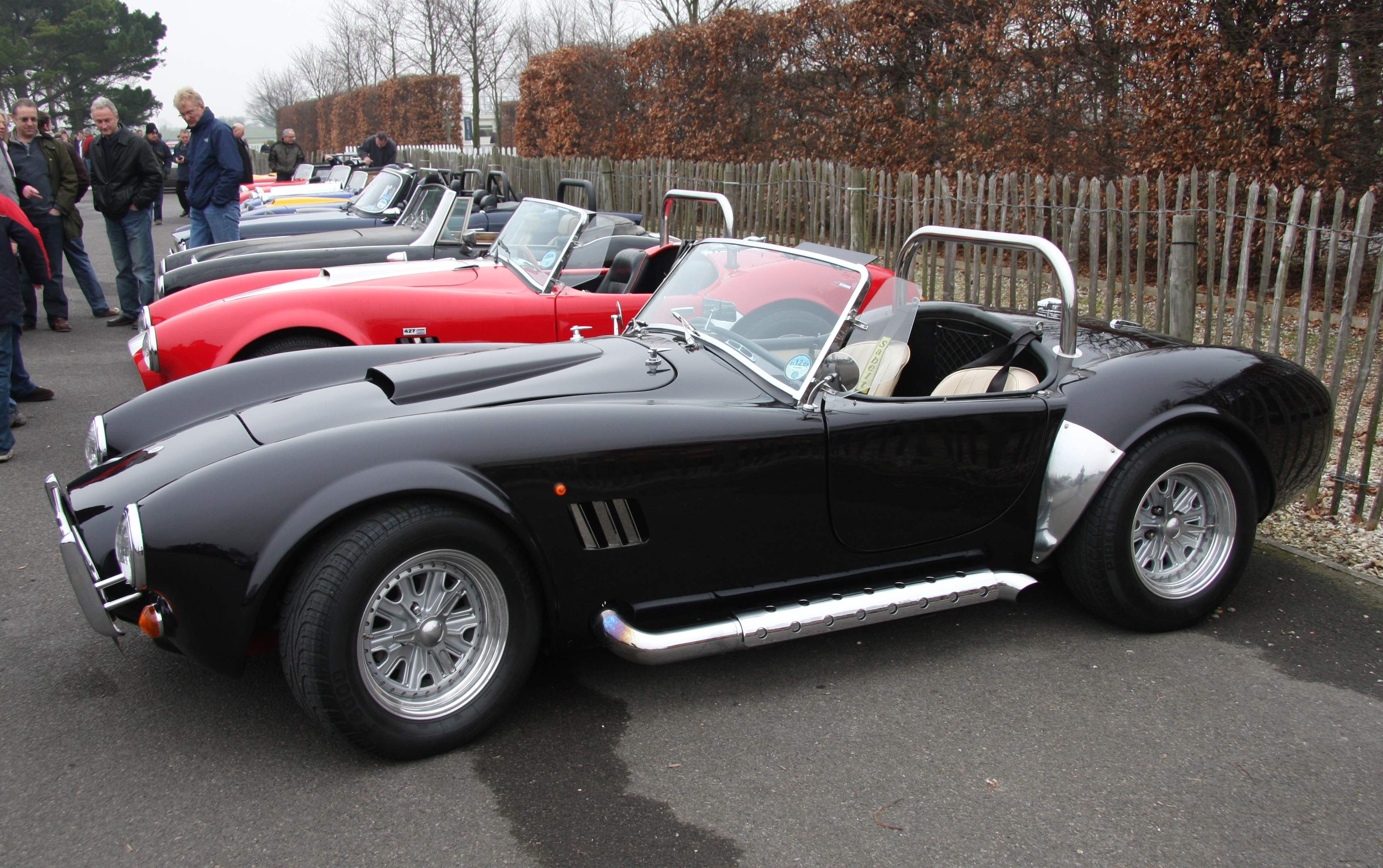 Pilgrim Cobra replica